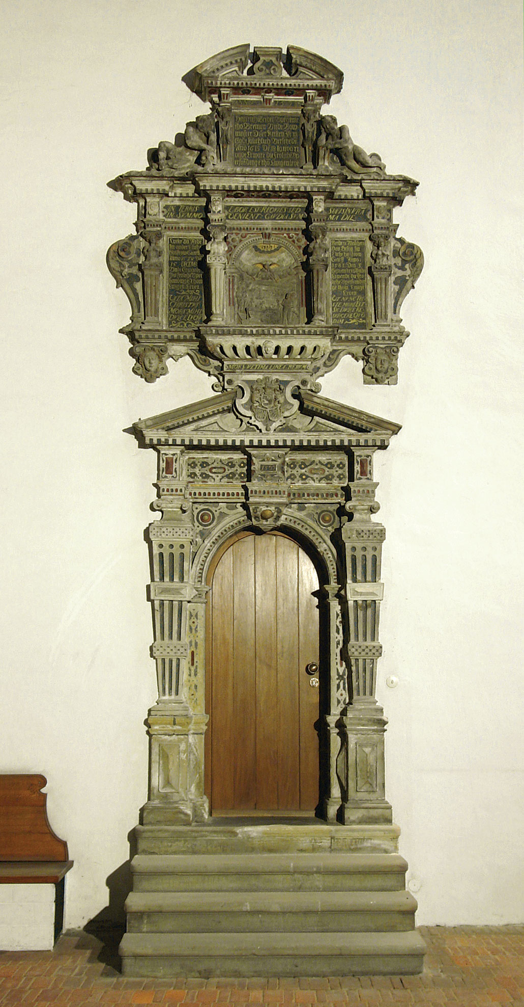 St.Martini-Kirche in Bremen. Portal zum Neanderhaus an der Südostseite der Kirche, 1597 von Henrich Zobel gestiftet